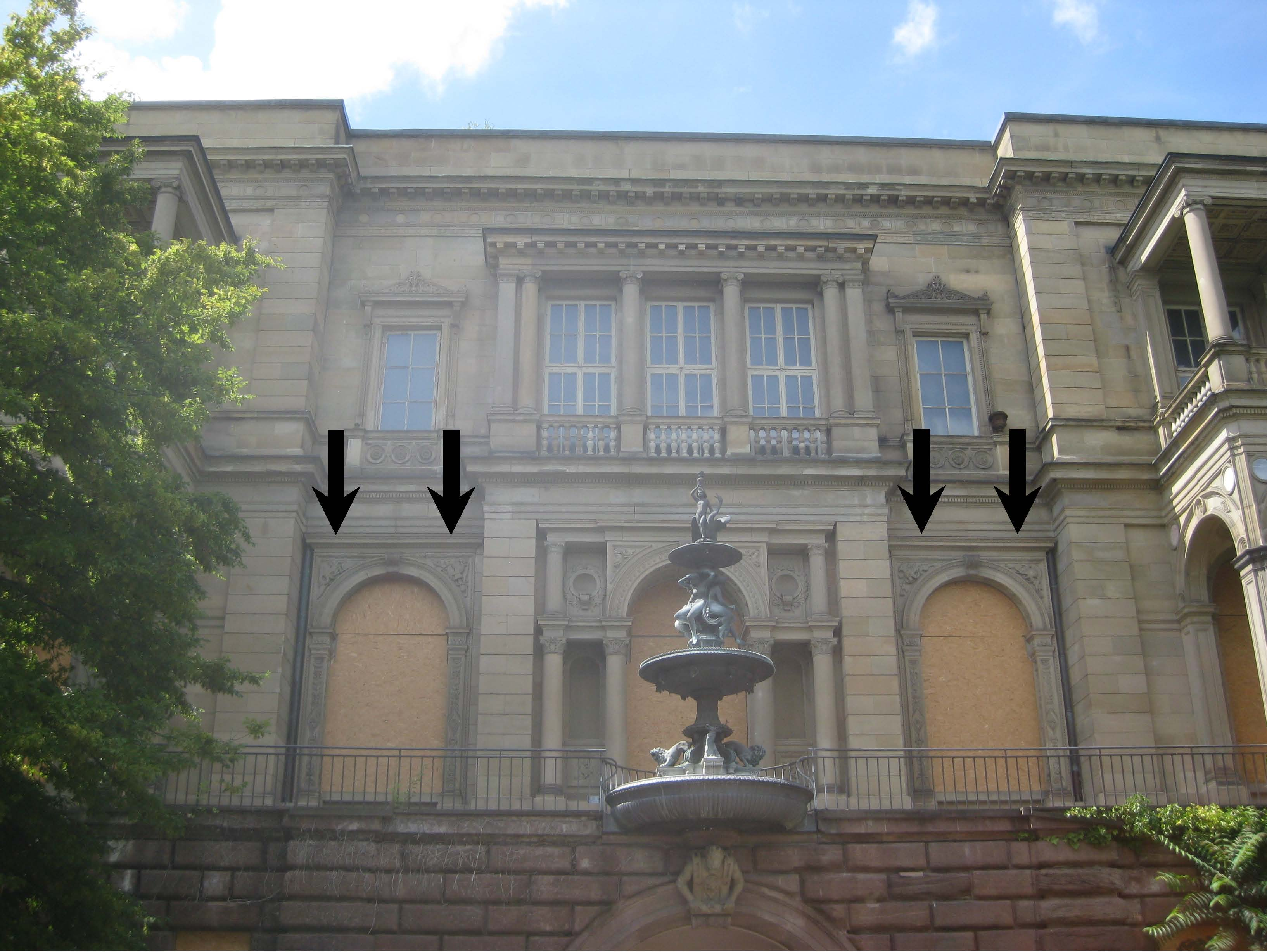 Stuttgart, Villa Berg, Ostfassade, mit Markierung der Position der Trophäenreliefs.